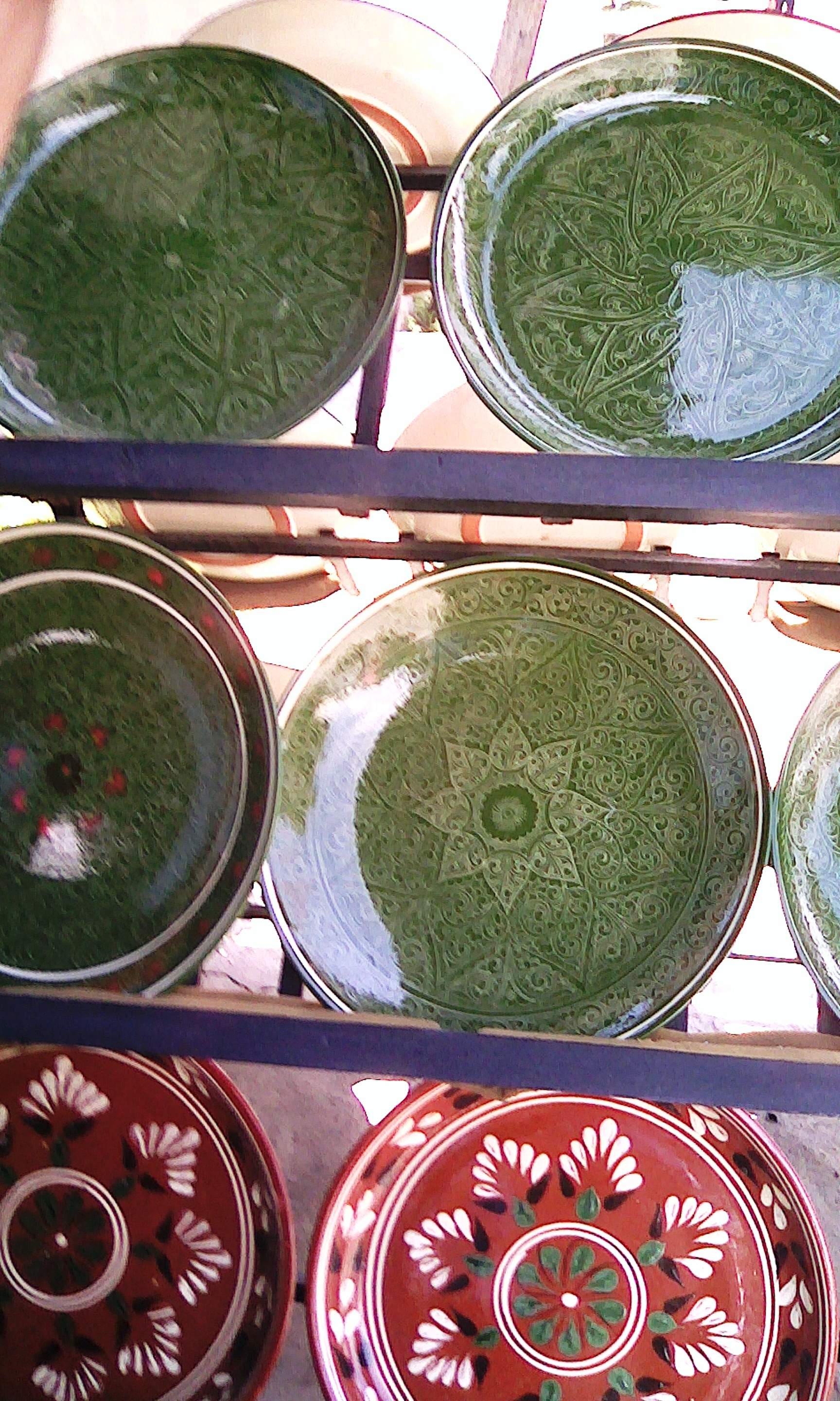 Тарелки для плова изготовленные народными ремесленниками. Прилавок в г. Душанбе